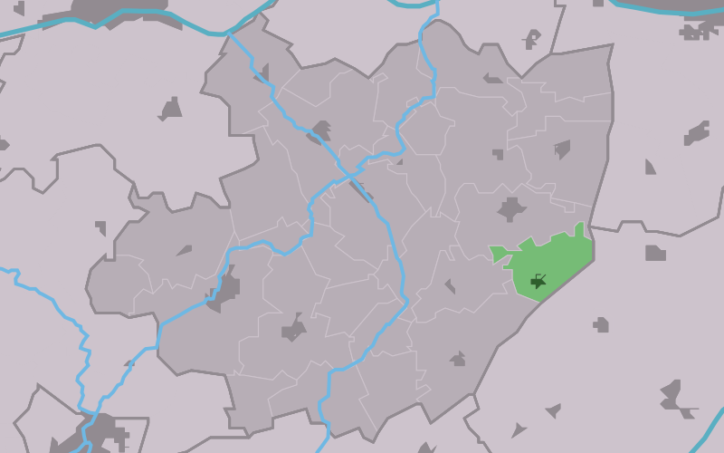 Kaartsje fan himrik fan Easterwierrum